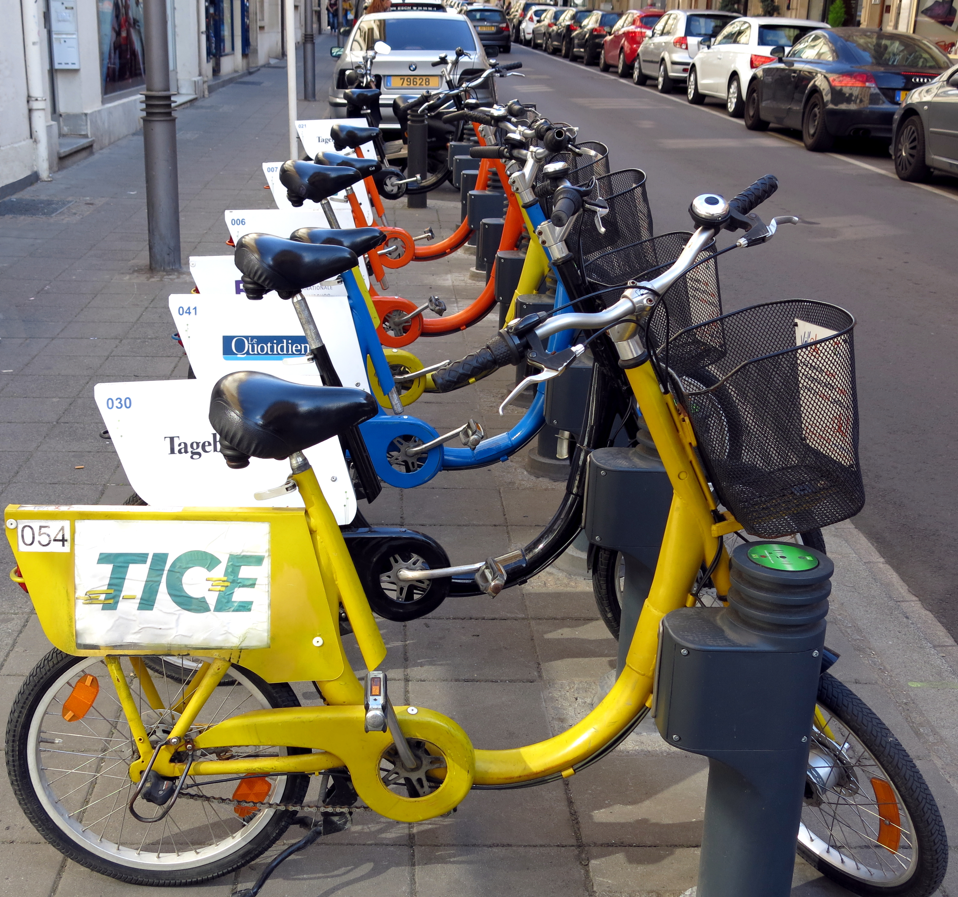 Vël'Oks-Statioun an der Rue du X Septembre zu Esch.